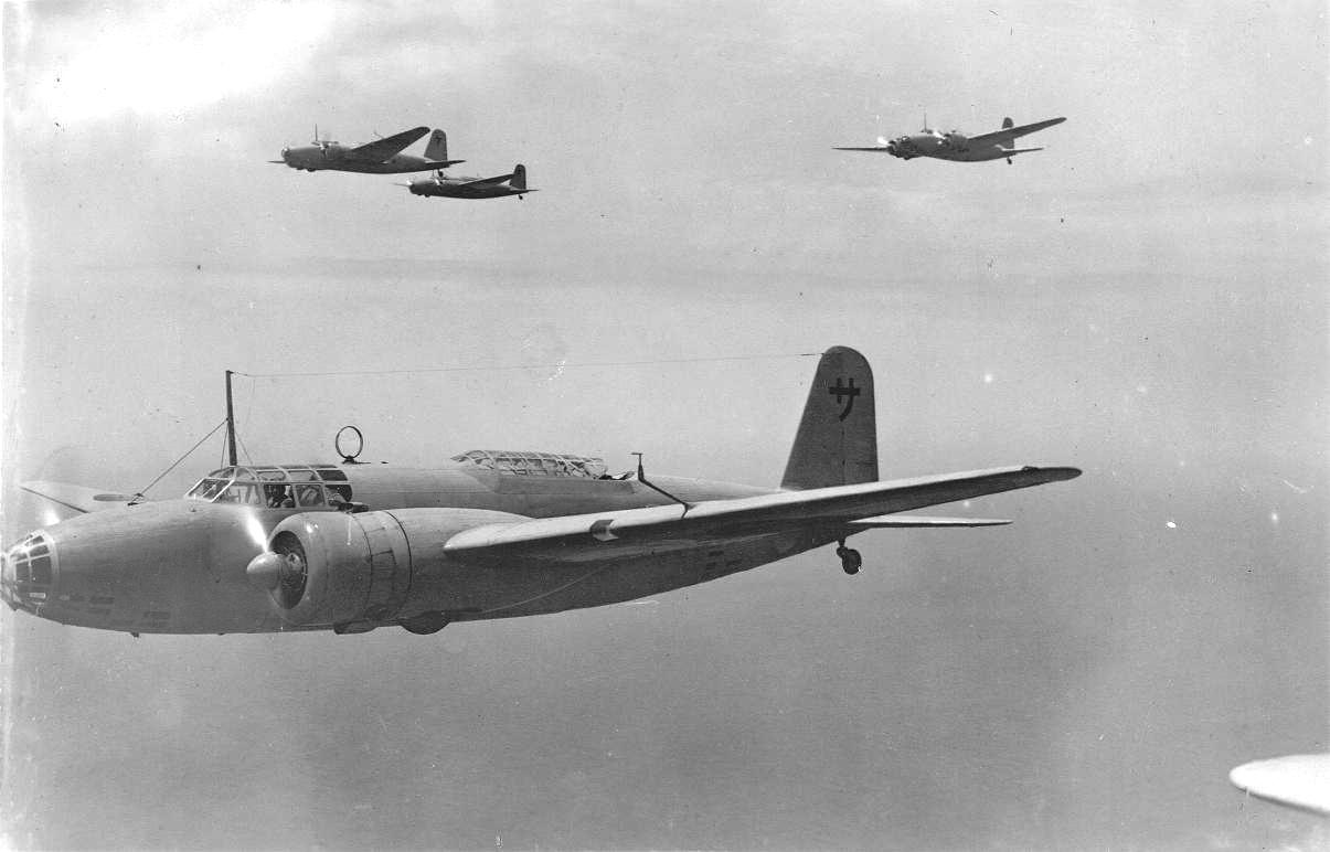 浜松付近んの上空で撮影された、97式重爆。